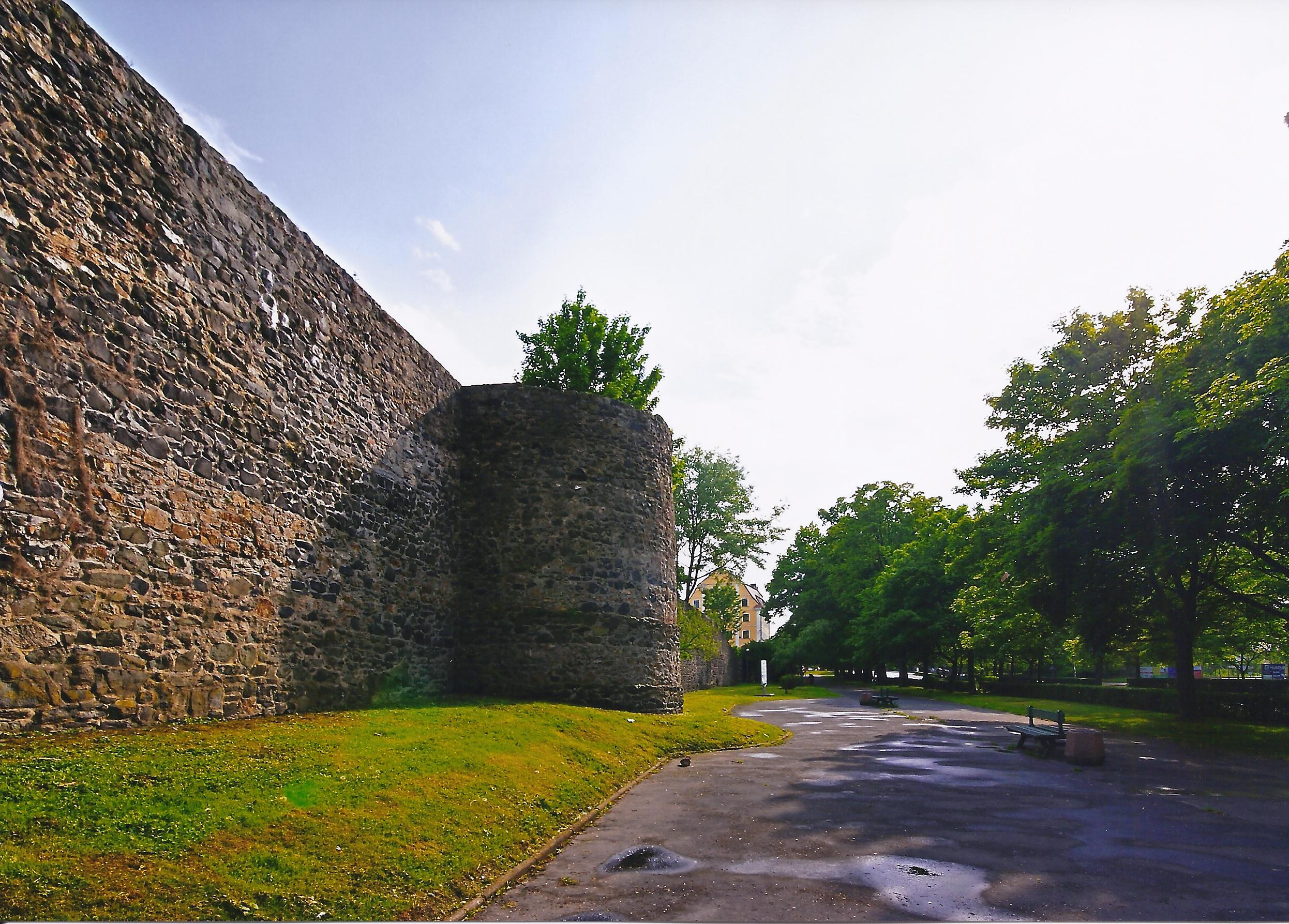 Lubańskie mury obronne